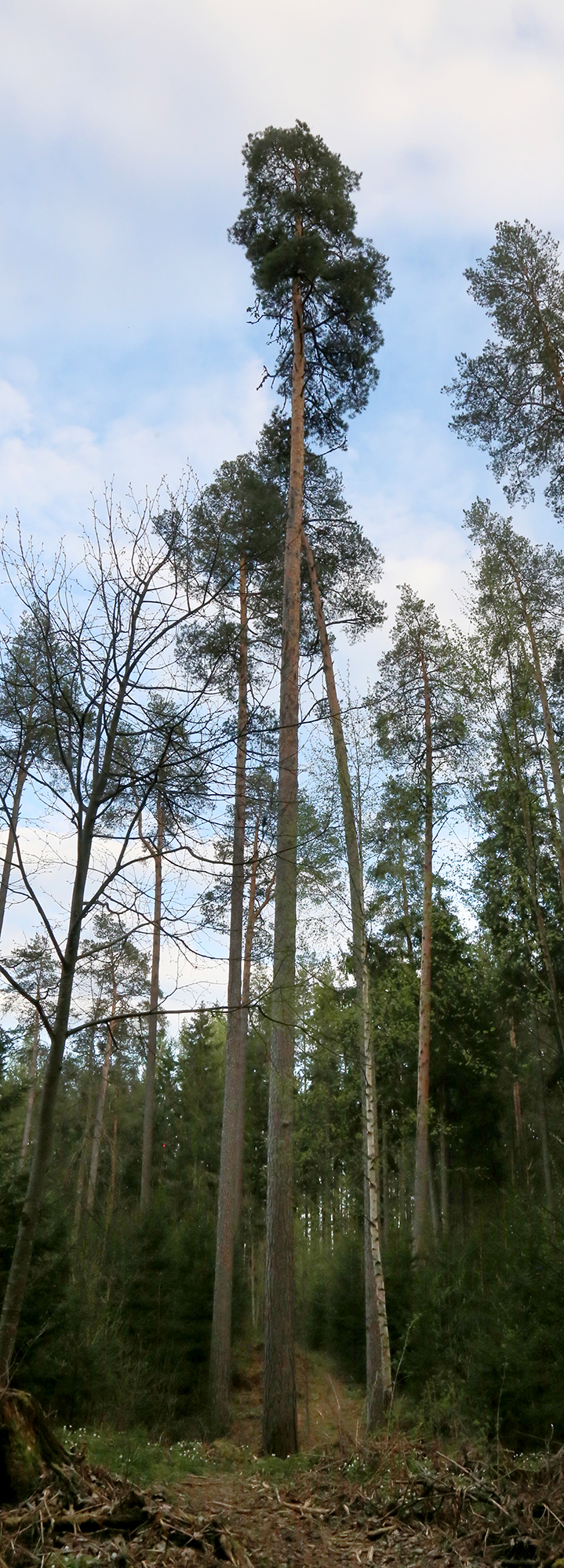 Ootsipalu oru hiiglane. Maailma kõrgeim harilik mänd 46,6 m. 2017